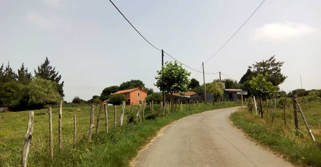 Vista de Señor, Curtis.